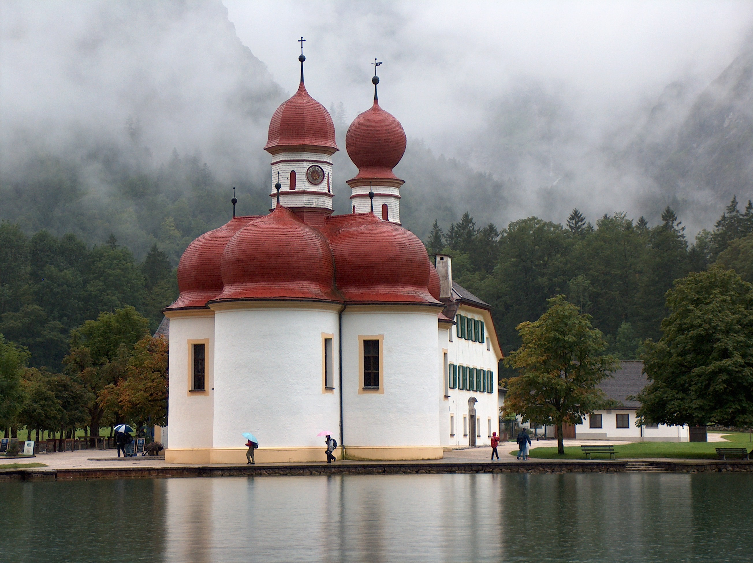 Паломническая церковь СвятогоВарфоломея (12 век) на Кёнигзее.